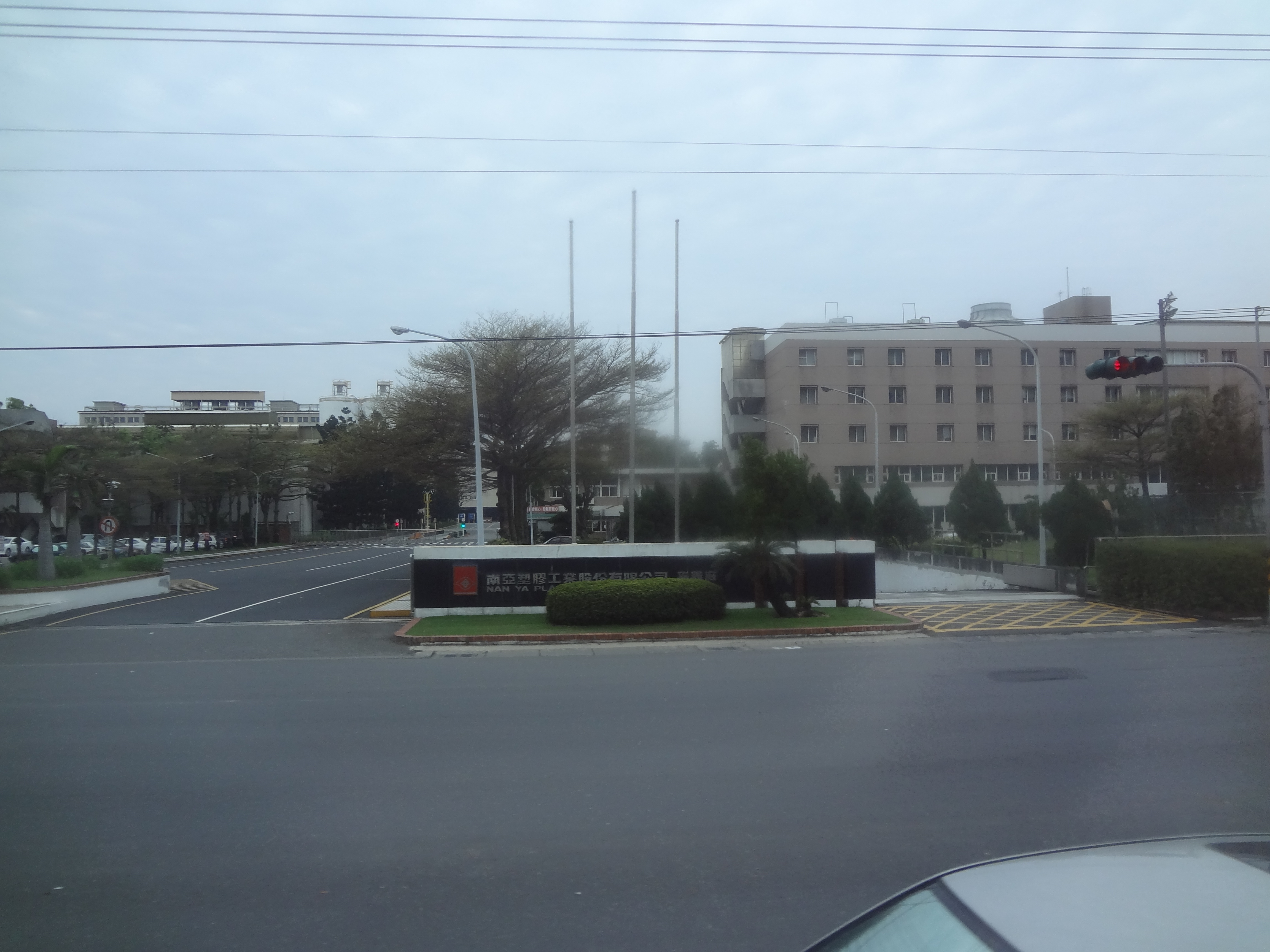 南亞塑膠嘉義廠，位於臺灣嘉義縣太保市北港路二段201號。本照片係於遊覽車上拍攝。